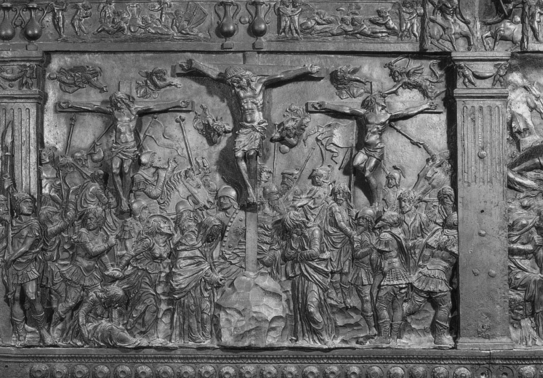 Il Pulpito della Passione, in San Lorenzo a Firenze, opera di Donatello. Dettaglio: Crocifissione. Fotografia Alinari, 1852.